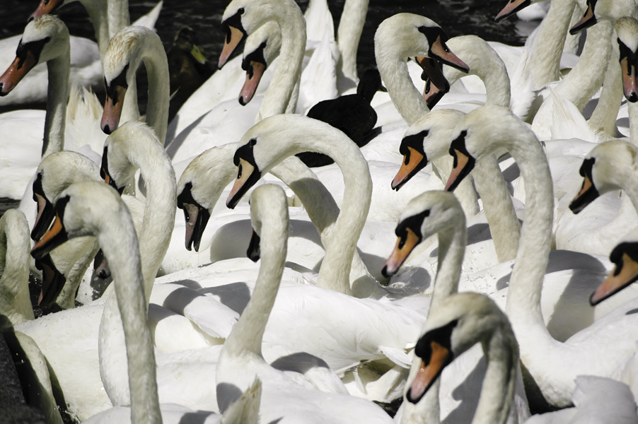 Schwäne auf der "kleinen Alster" in Hamburg